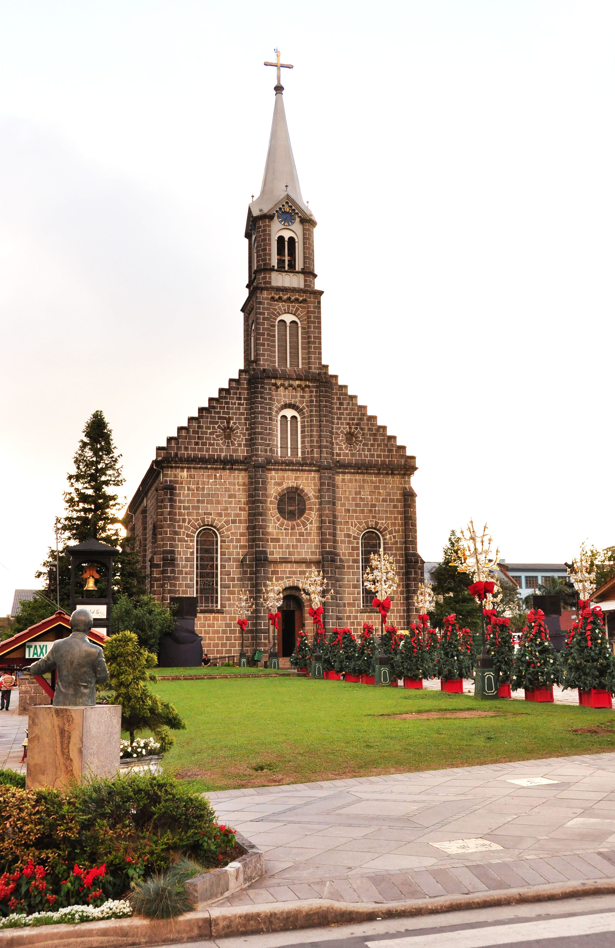 Igreja Matriz São Pedro em Gramado, RS, Brasil